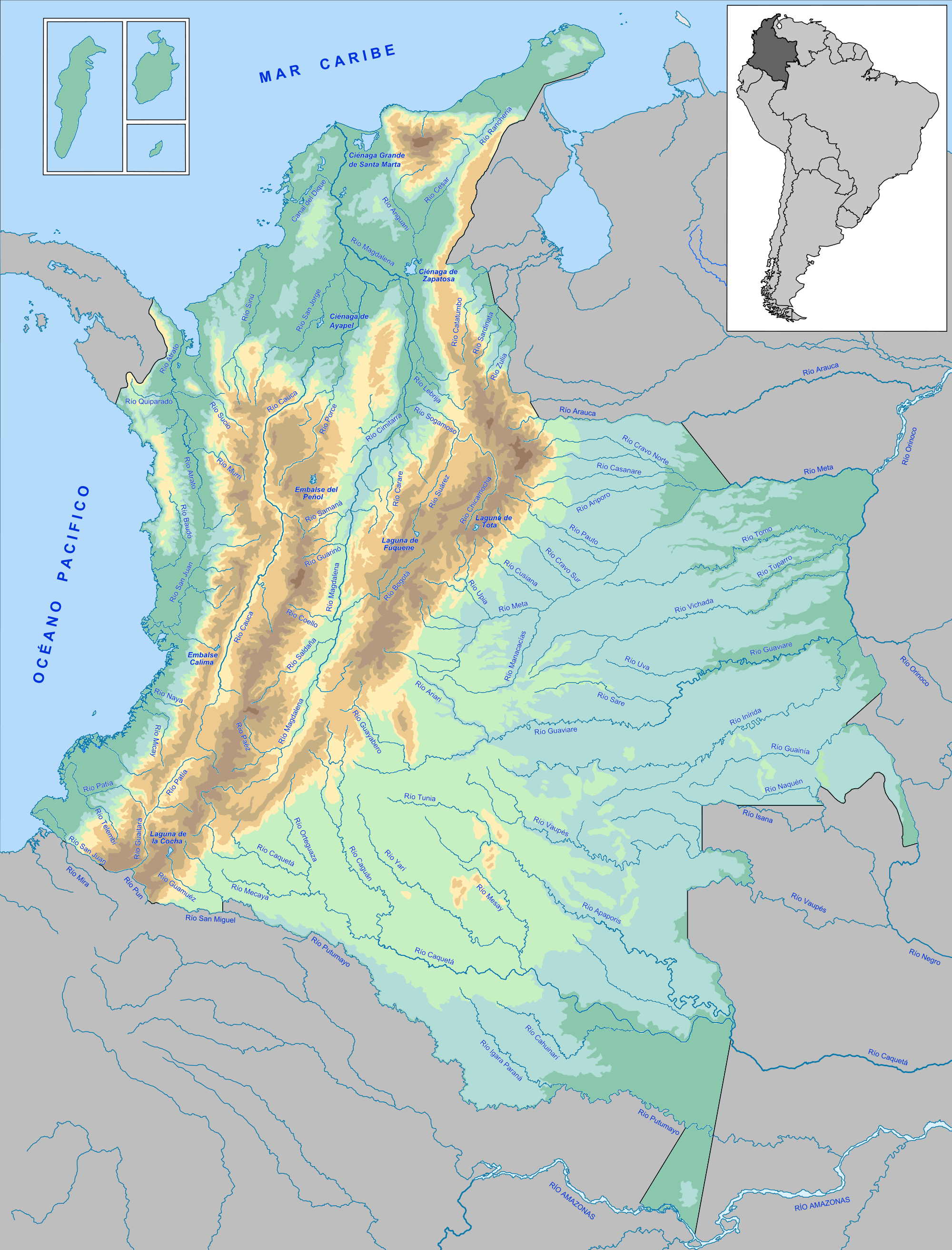 Mapa físico de los ríos de Colombia